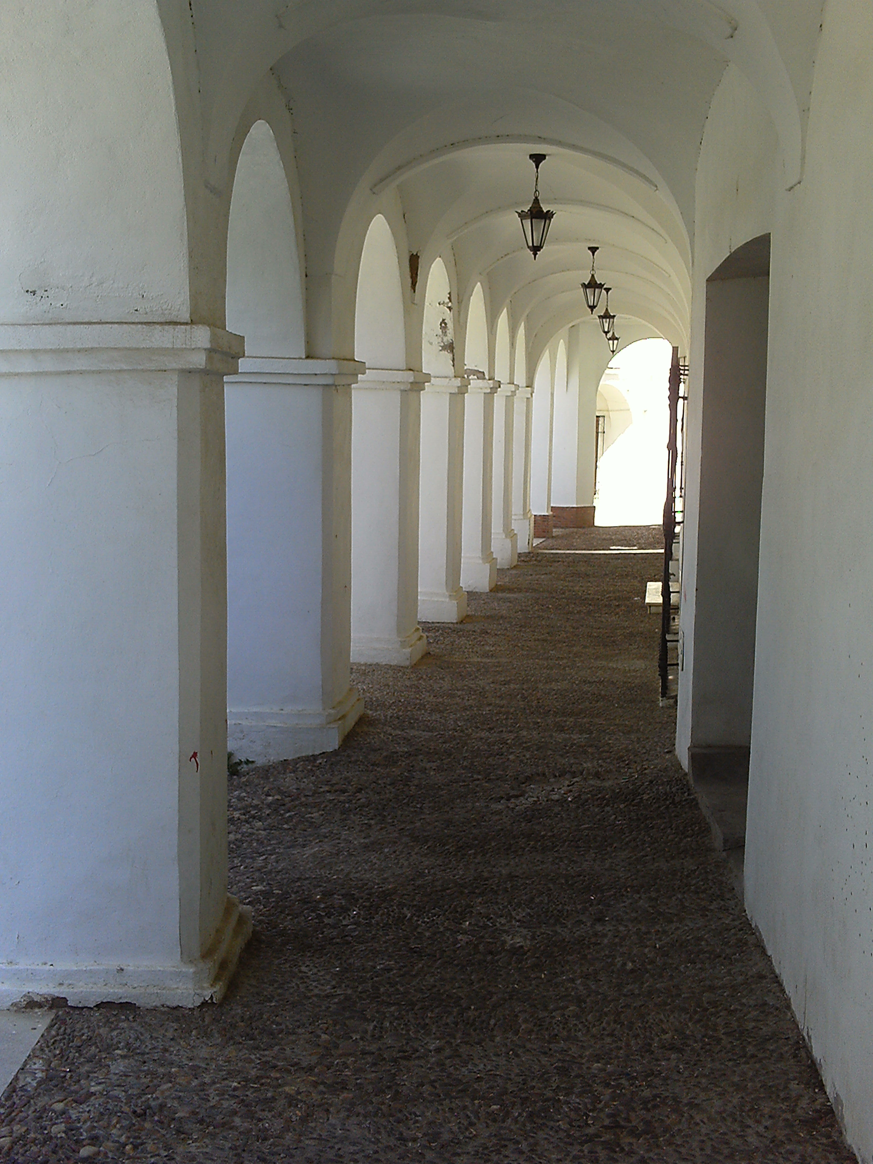 Galerias porticadas de la plaza de España